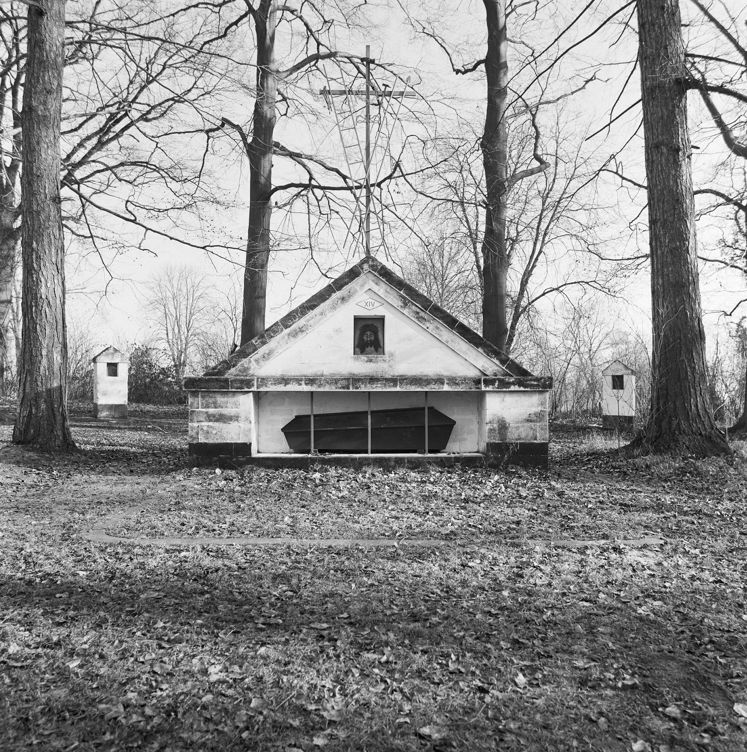 De Kluis: Exterieur KRUISWEG STATIE XIV